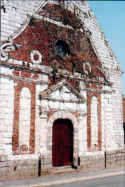 L'église de frevillers